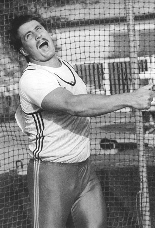 Jürgen Schult ADN-Friedrich Gahlbeck-Dresden: 41. DDR-Meisterschaften in der Leichtathletik Beim Diskuswerfen wurde der Olympiasieger und Weltrekordmann Jürgen Schult (Schwerin) mit 65,70 M letzter DDR-Meister in dieser Disziplin. Abgebildete Personen: Schult, Jürgen: Diskuswerfer, Olympiateilnehmer 1988, DDR